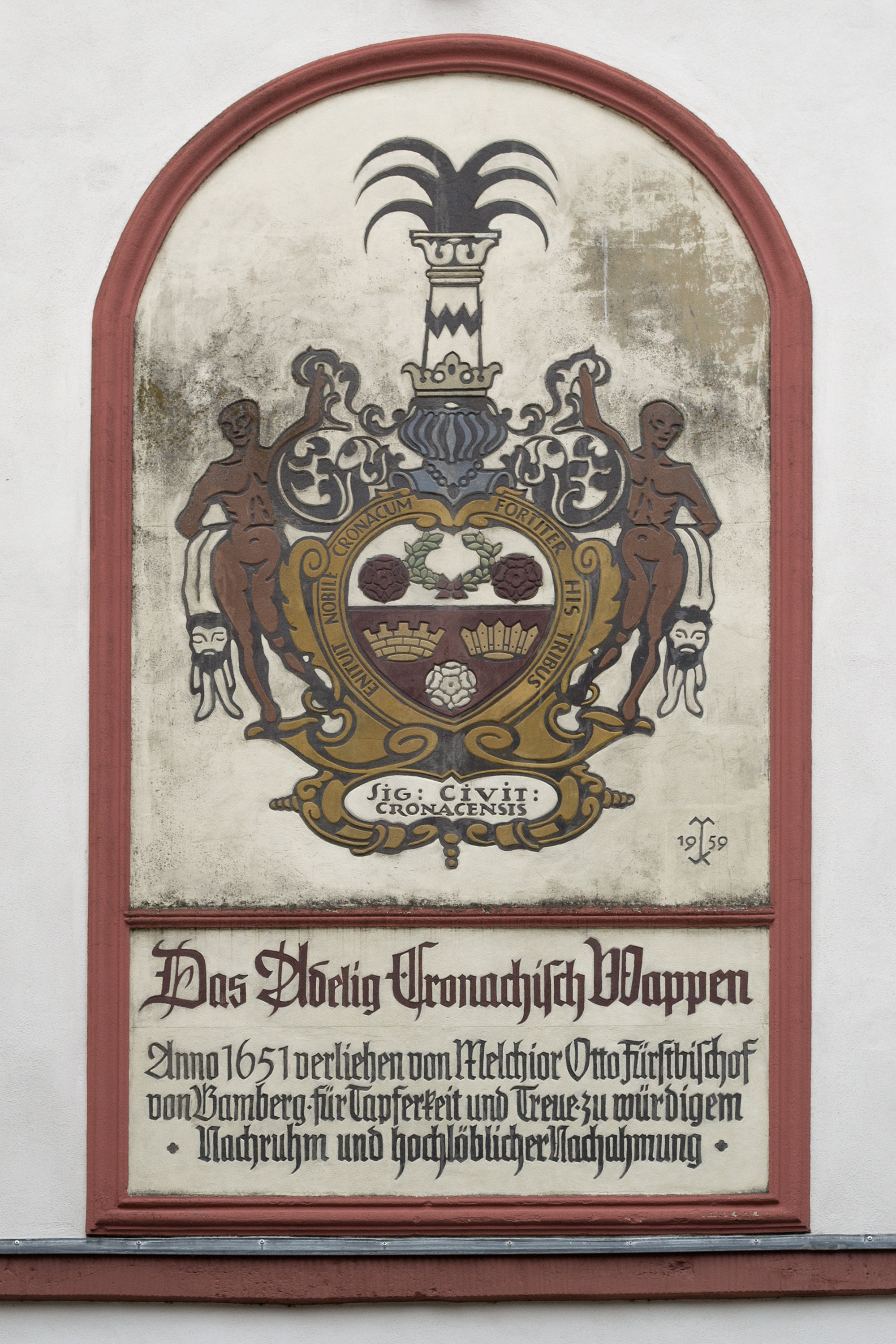 Darstellung des Kronacher Stadtwappens von 1651 an der Westseite des Alten Rathauses in Kronach.